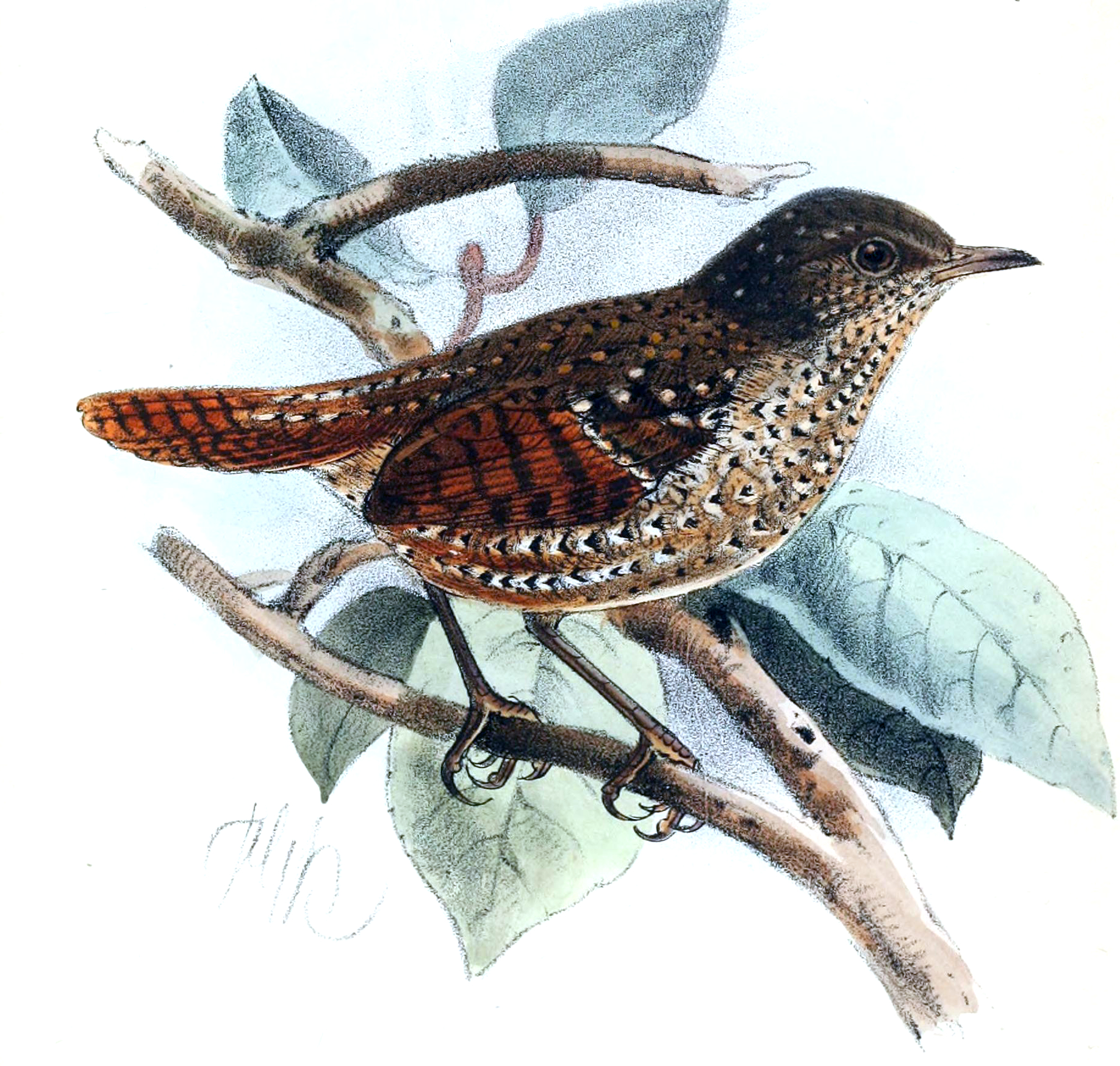 Elachura punctata = Spelaeornis formosus [1]